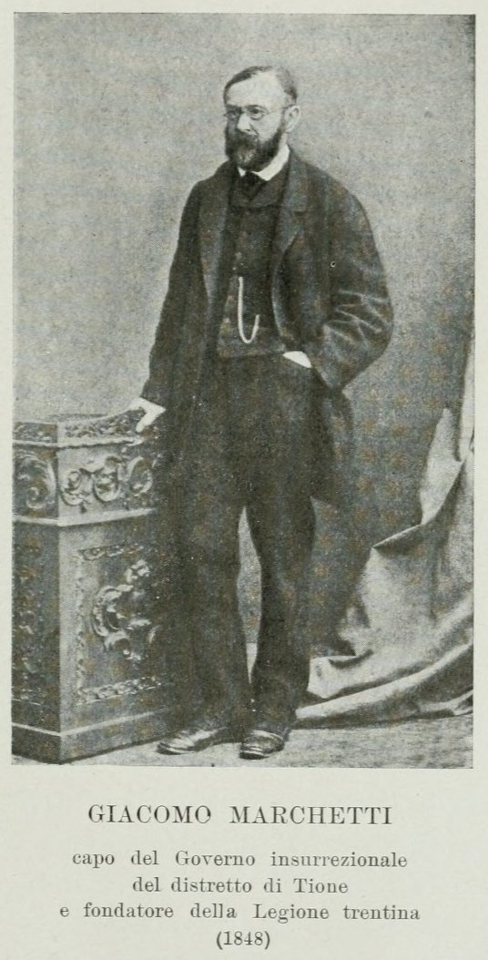 Giacomo Marchetti, capo del Governo insurrezionale del distretto di Tione e fondatore della Legione trentina (1848).